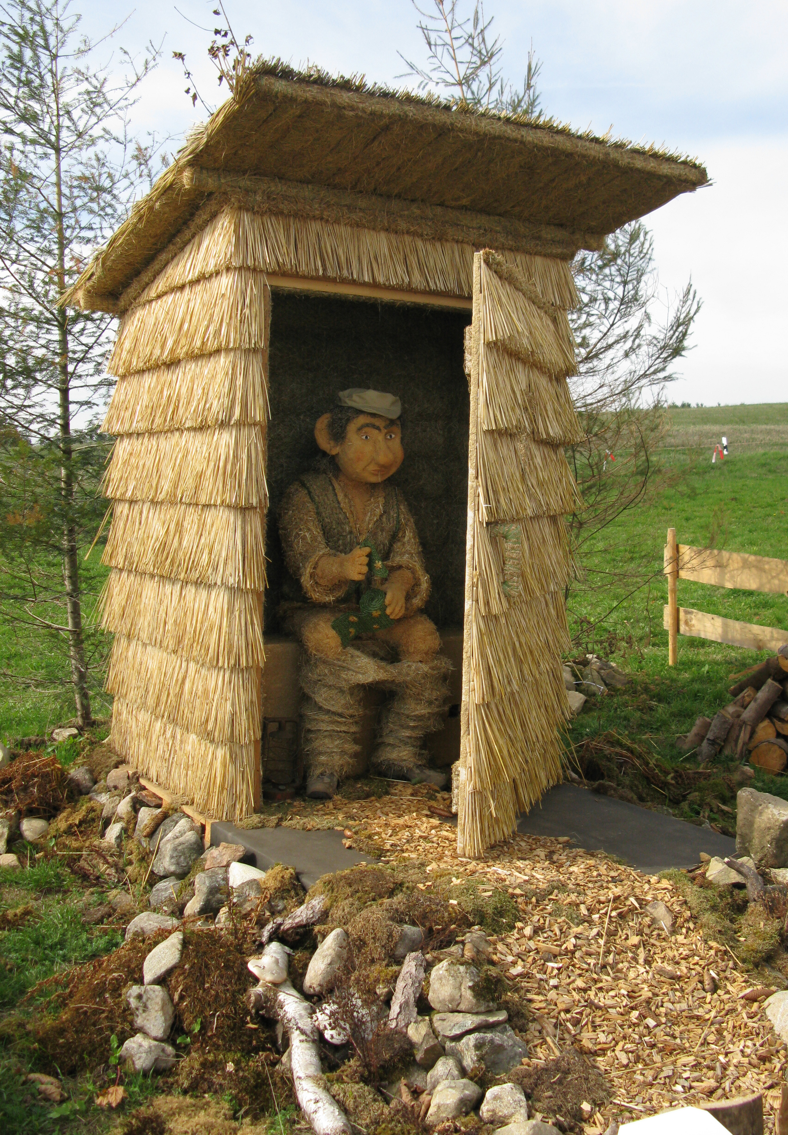 Strohskulpturen in Höchenschwand, 1. Preis